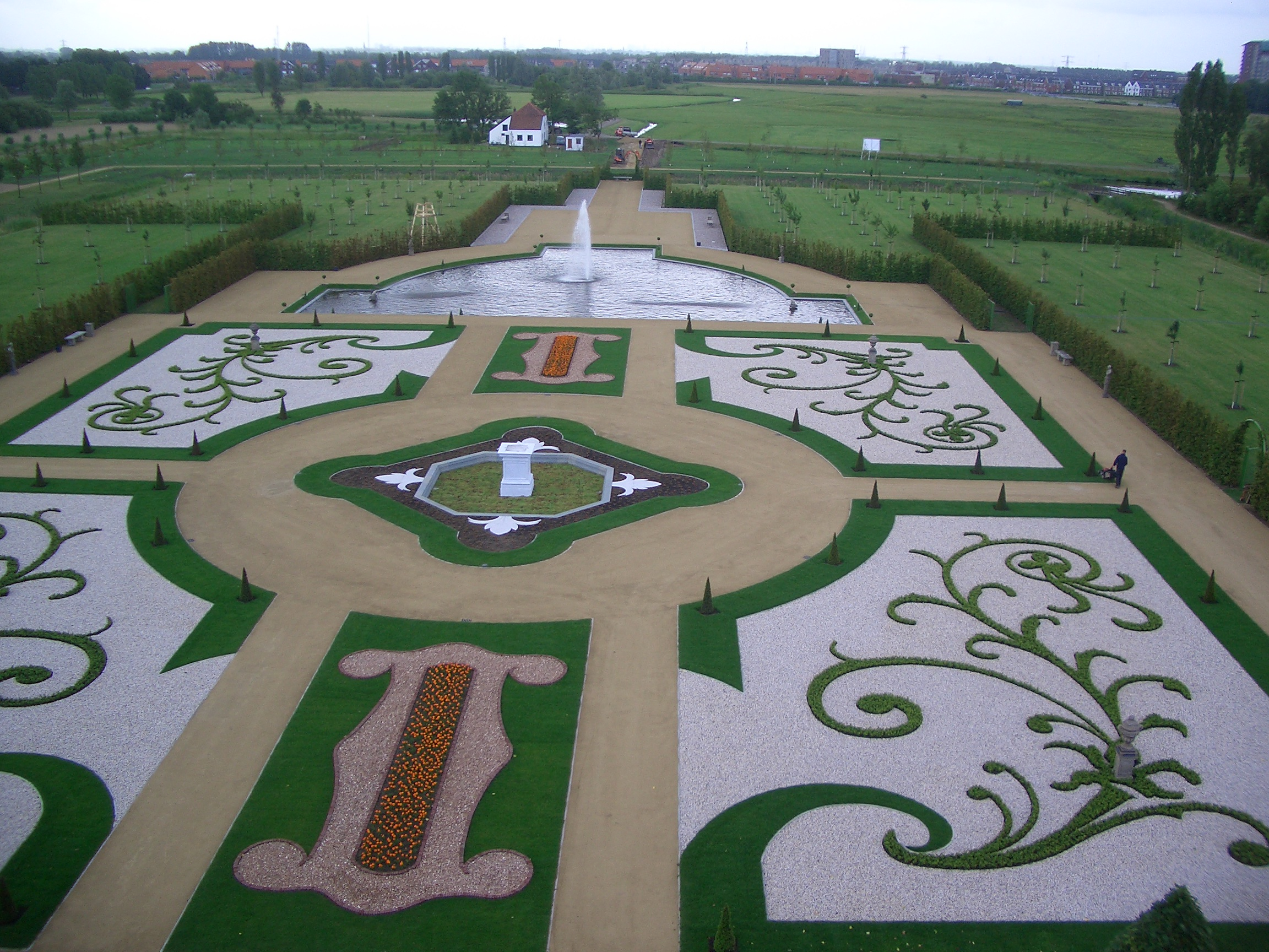 Bovenaanzicht kasteeltuin Assumburg, Heemskerk